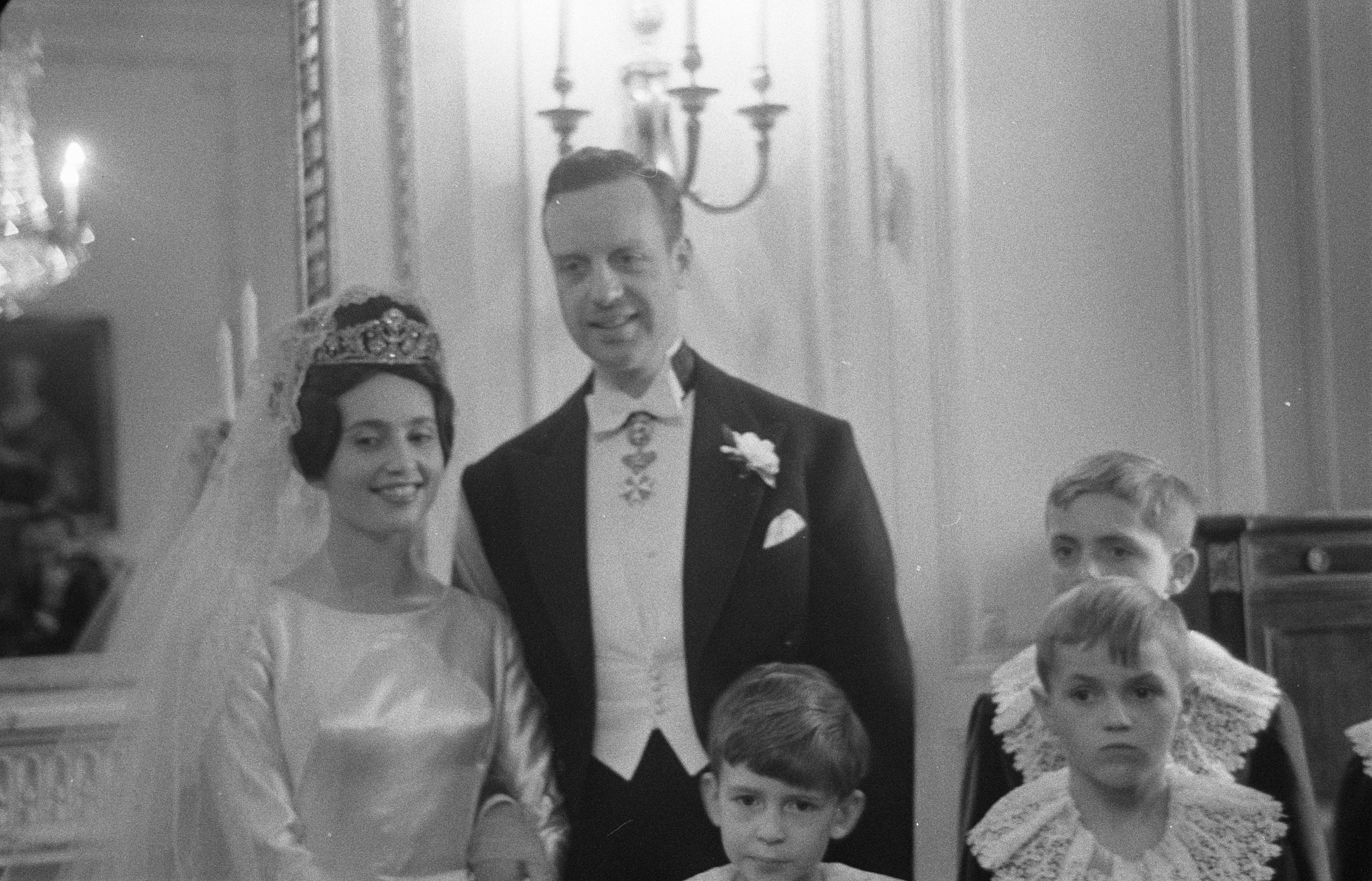 Collectie / Archief : Fotocollectie Anefo Reportage / Serie : [ onbekend ] Beschrijving : Huwelijk van Prinses Francoise van Bourbon Parma met Prins Eduard van Lobkowicz in Parijs Datum : 7 januari 1960 Locatie : Frankrijk, Parijs Trefwoorden : huwelijken Persoonsnaam : Prins Eduard van Lobkowicz Fotograaf : Pot, Harry / Anefo Auteursrechthebbende : Nationaal Archief Materiaalsoort : Negatief (zwart/wit) Nummer archiefinventaris : bekijk toegang 2.24.01.05 Bestanddeelnummer : 910-9251